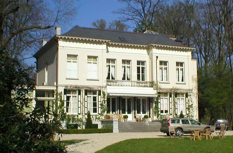 eigen foto JCR 2003